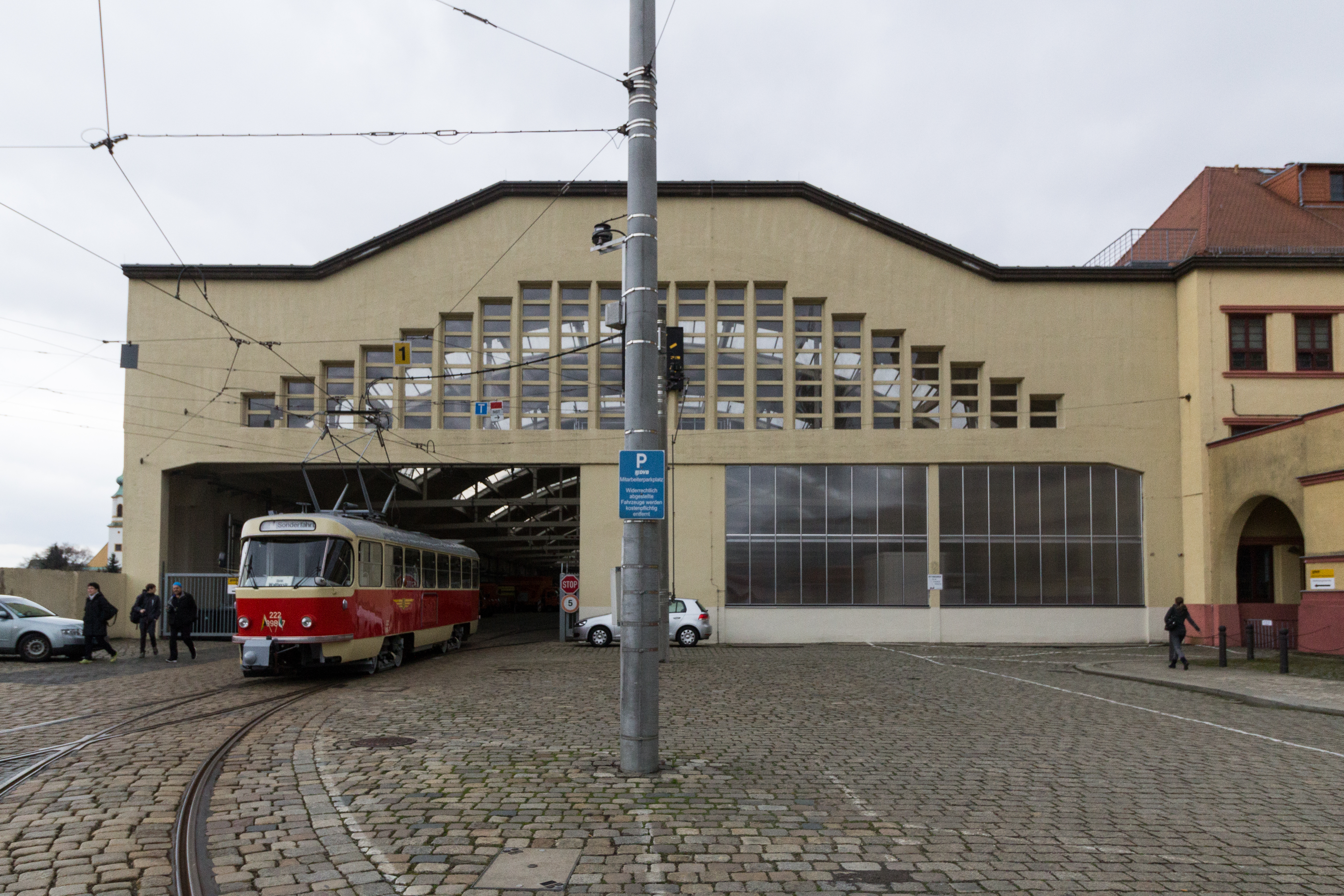 Straßenbahn 222 998-7 - im Betriebshof Waltherstraße